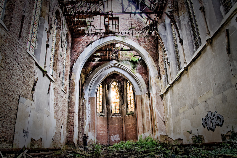 Kasteel van Mesen, Lede, Belgium (14 of 19)